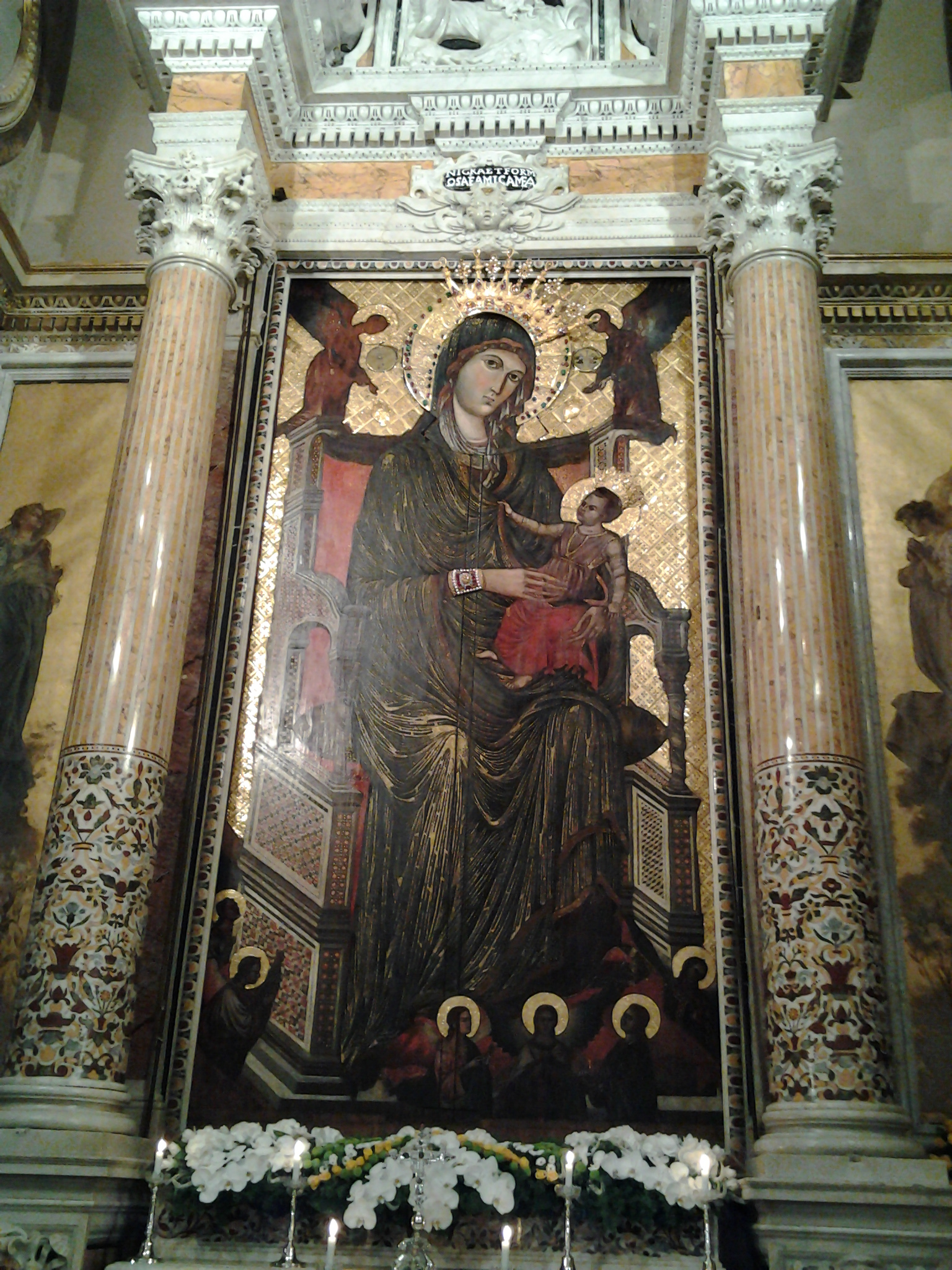 Immagine della Madonna ricollocata nella sua cappella antica dopo il restauro del 2010-12